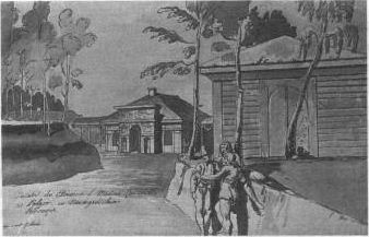 Панямоньская сядзіба